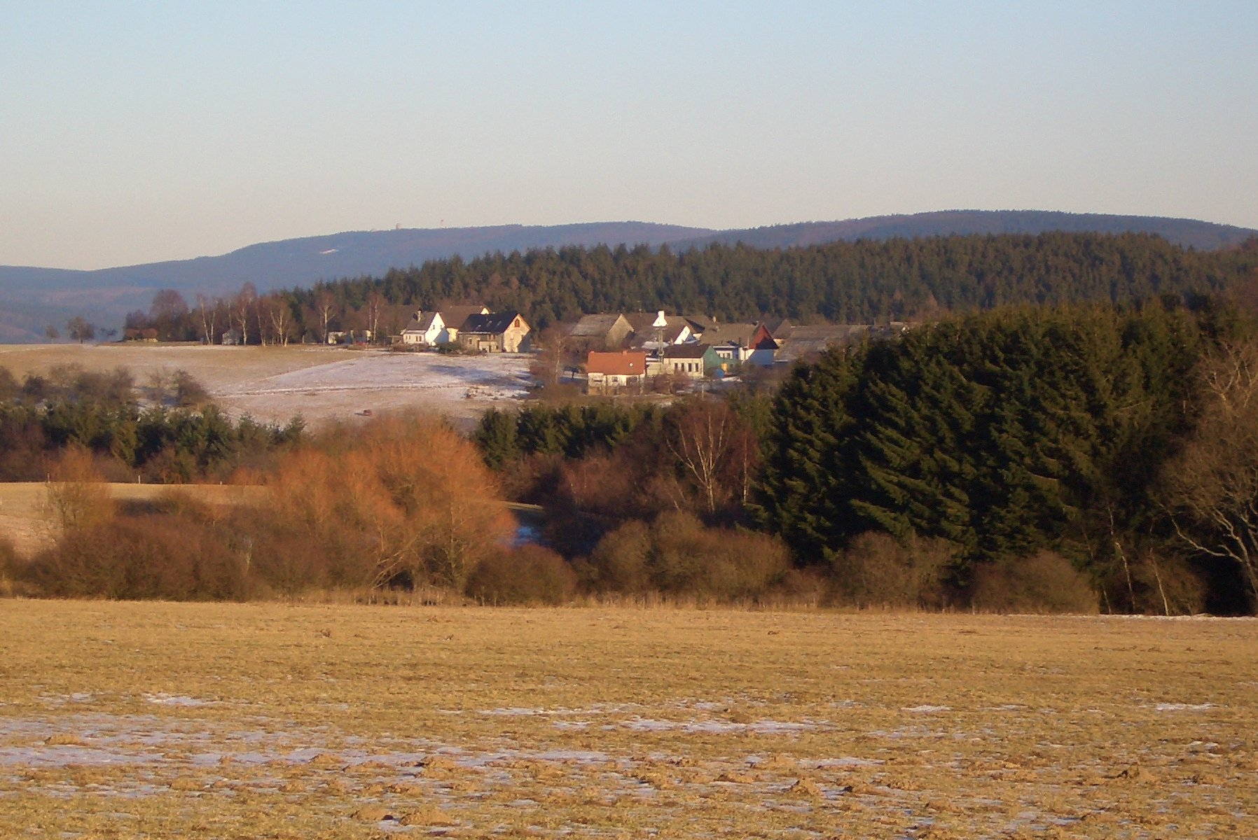 Pölert, seen from SS-Sonderlager/KZ Hinzert